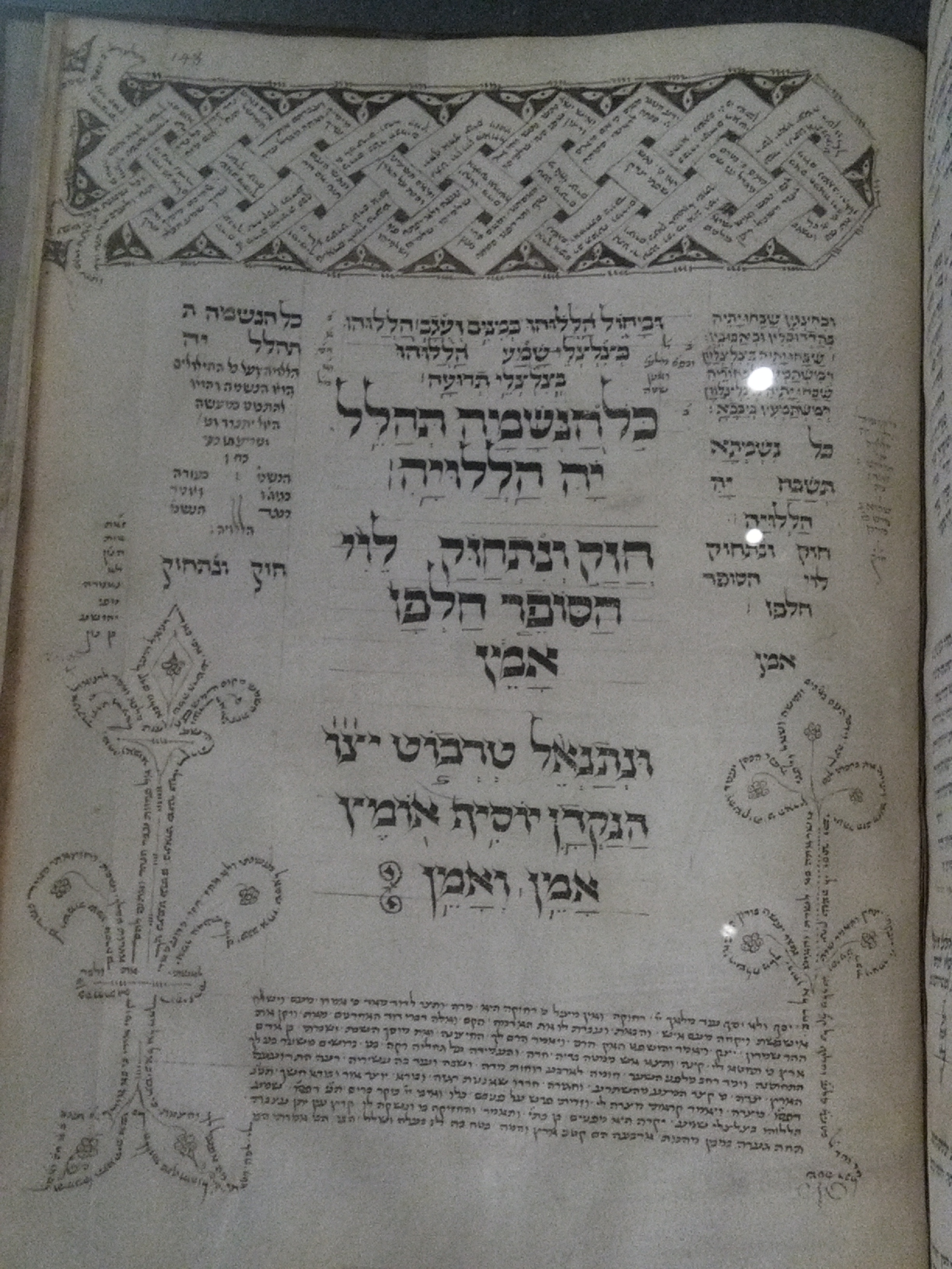 Bibliothèque nationale de France. Manuscrit hébreu 114. Psaumes avec targoum, massora et commentaires de David Qimhi. Italie du Nord vers 1470-1480. Parchemin. Hébreu et araméen. Scribes : Halfan et Nethanel de Trevot (Trévoux), ponctuateur